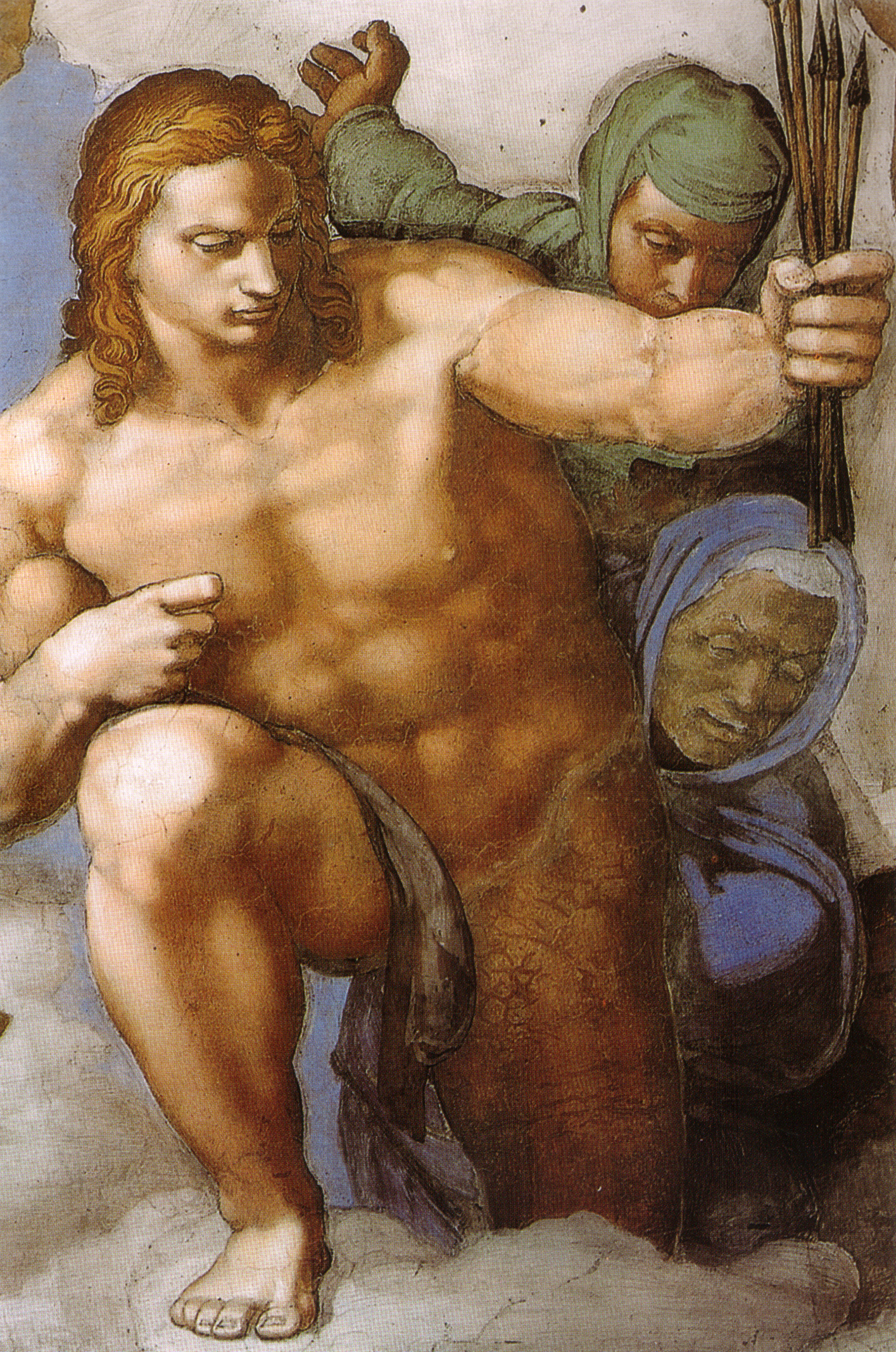 MICHELANGELO Buonarroti Last Judgment Fresco, 1370 x 1220 cm Cappella Sistina, Vatican